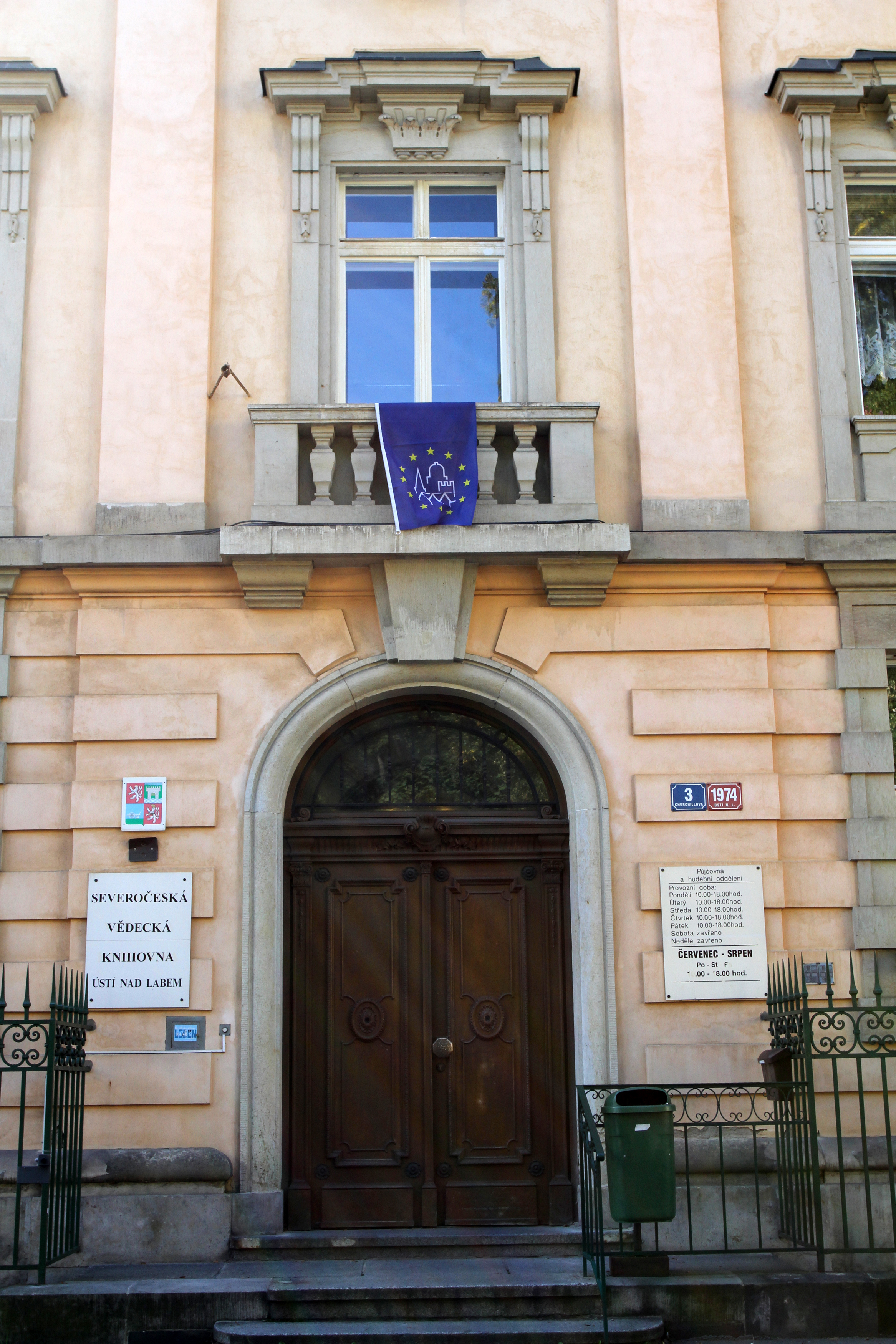 Weinmannův palác (Ústí nad Labem), W. Churchilla 1974/3, Ústí nad Labem